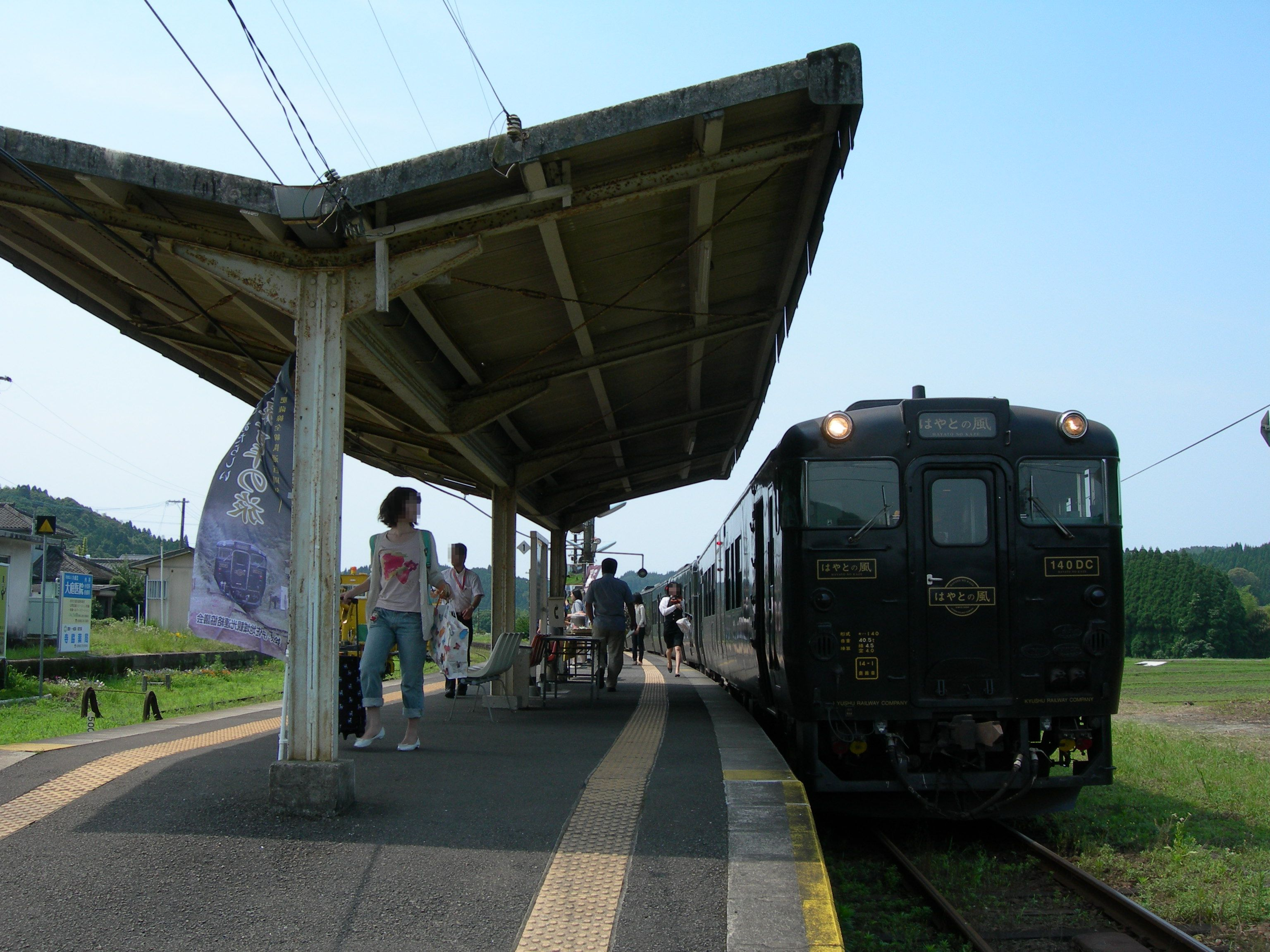 霧島温泉駅プラットホーム